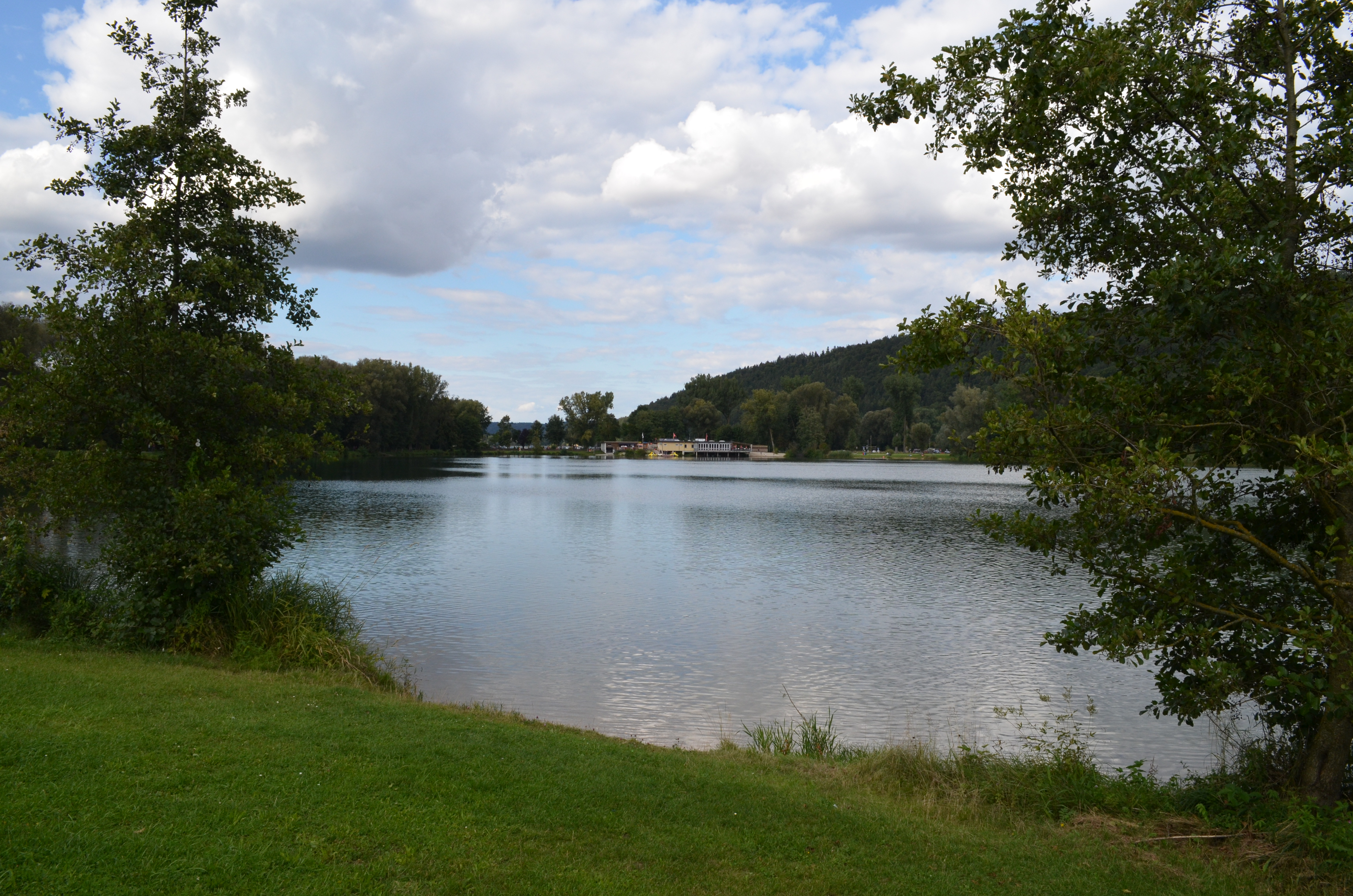 Kratzmühlsee vom Südufer Richtung Norden